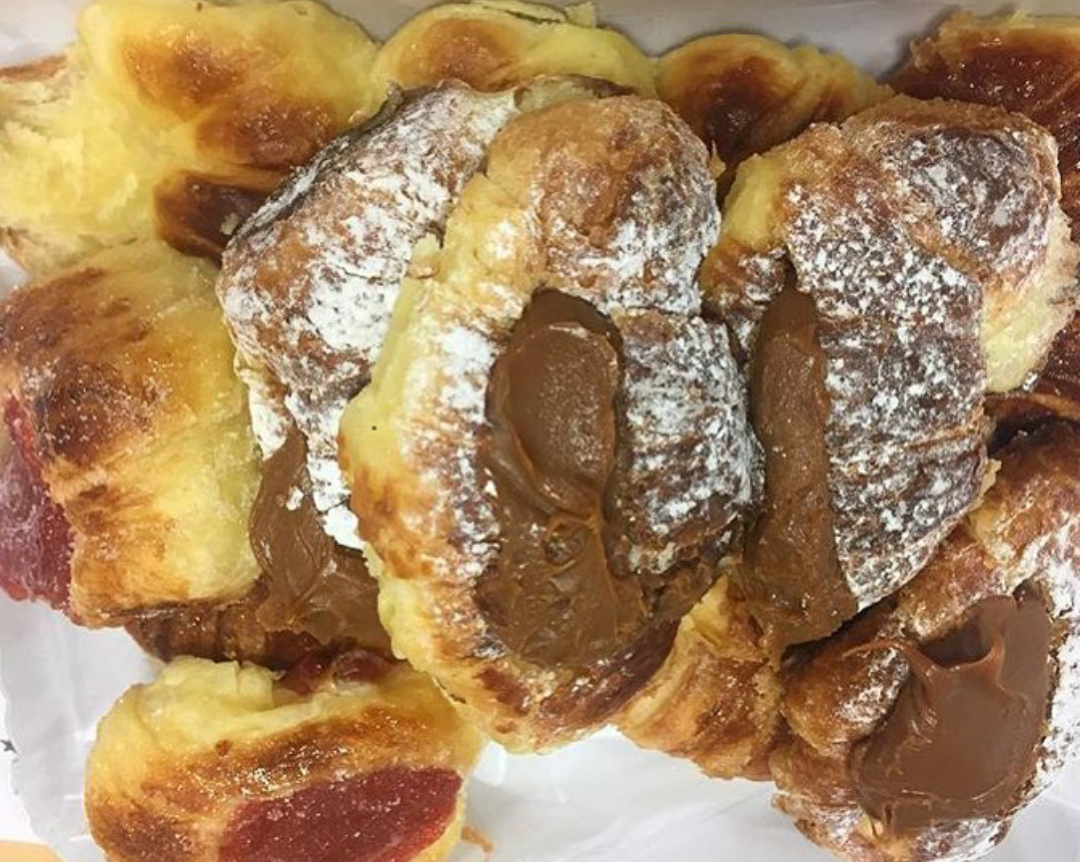 Tosteles costarricenses (cosillas y lazos) de fresa y dulce de leche